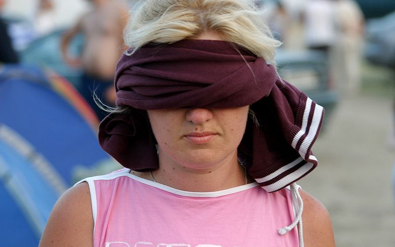 фотография с игры